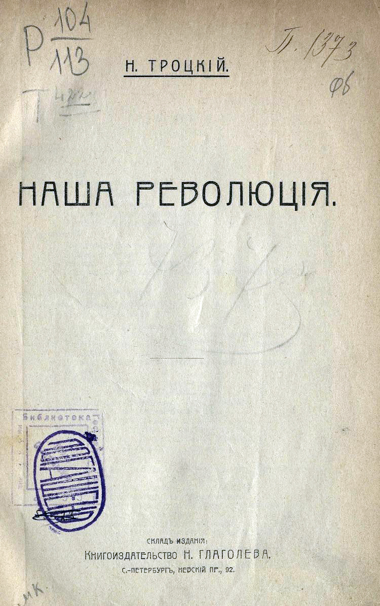 Троцкий - Наша революция, 1906 - обложка